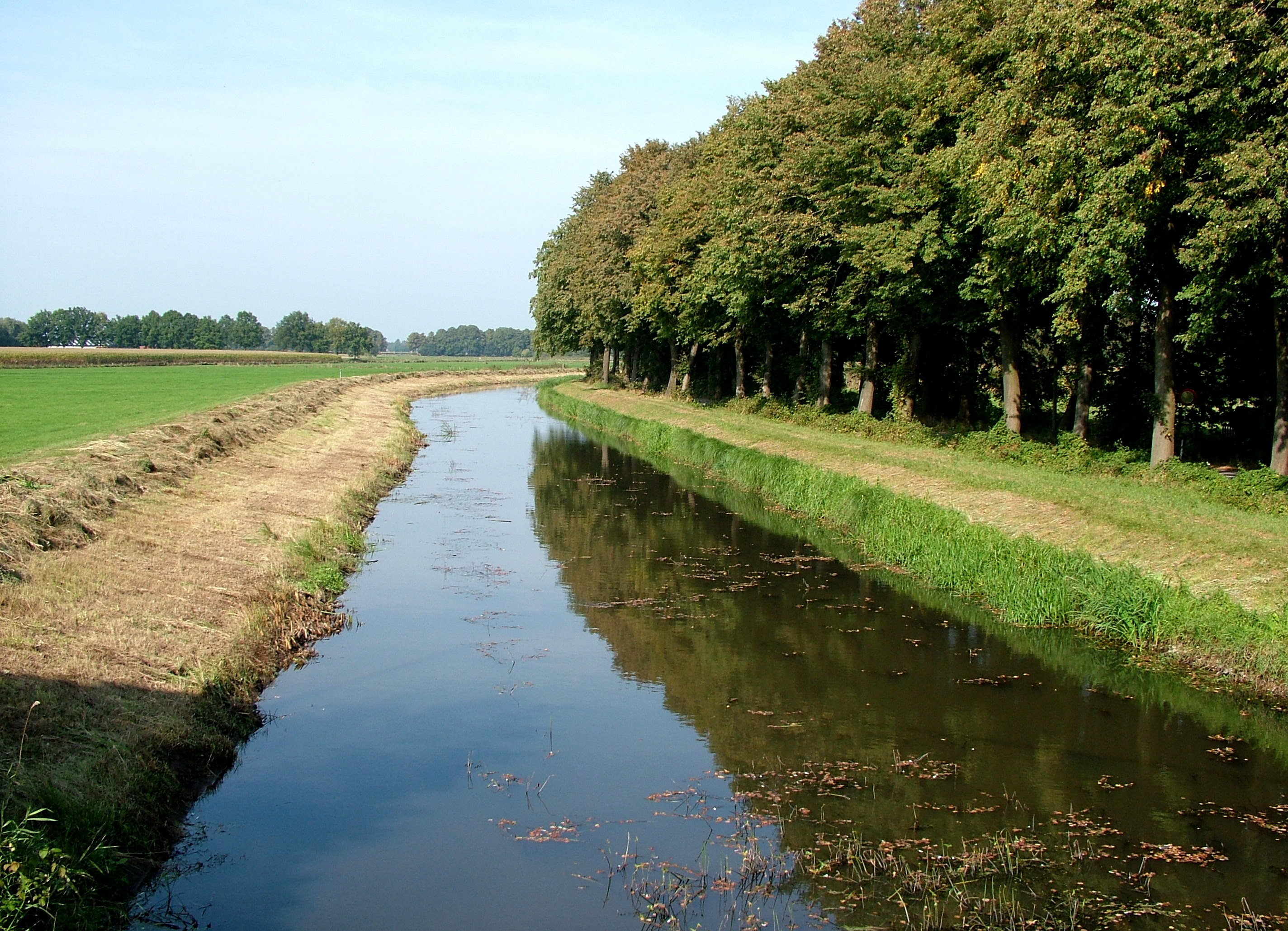 Anholt (Isselburg), Oude IJssel an der Grenze zu den Niederlanden